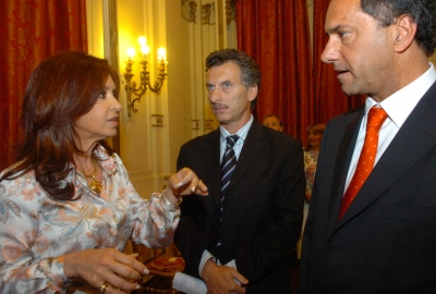 Cristina, Macri y Scioli en la adjudicación de las obras del Ferrocarril Sarmiento